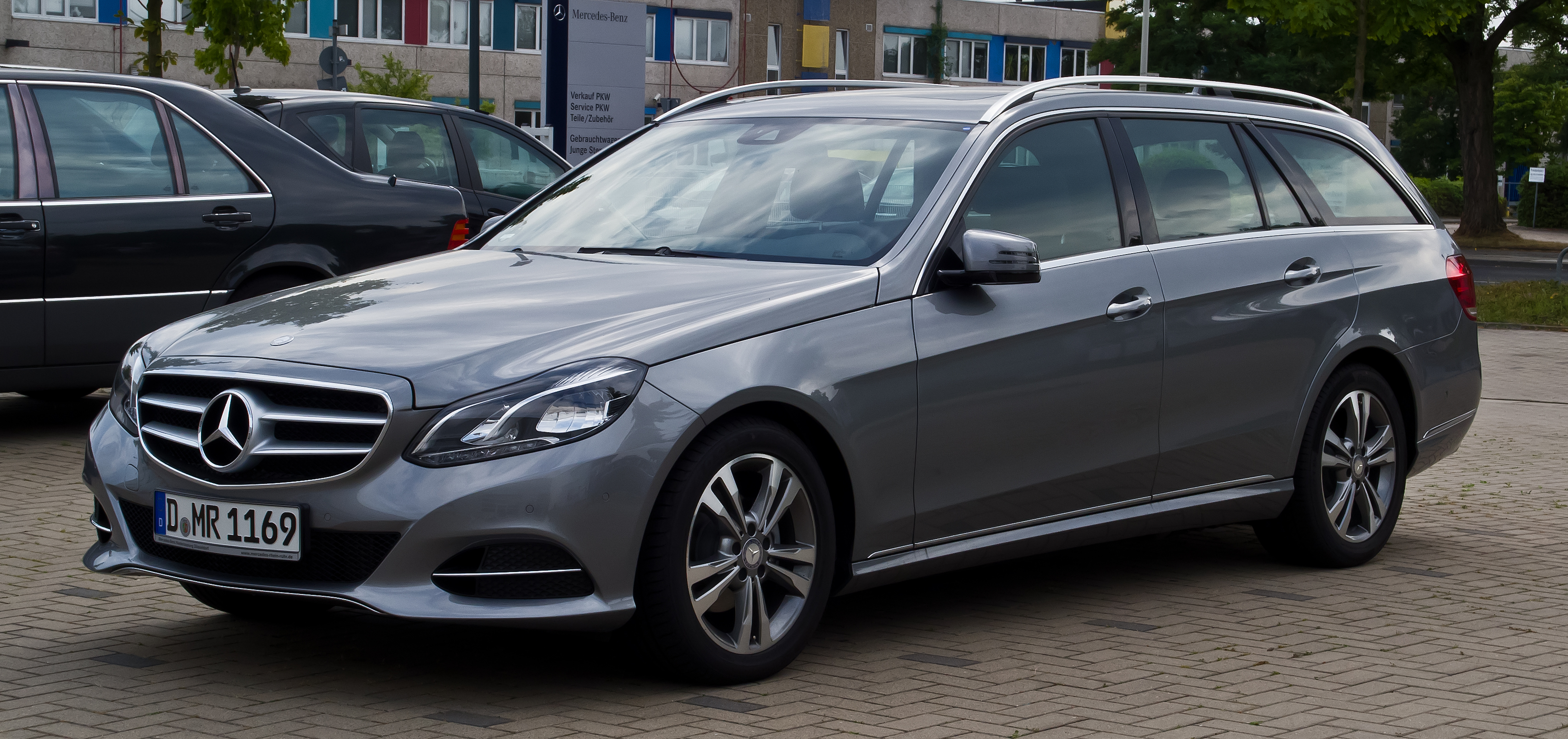 Mercedes-Benz E 220 CDI T-Modell Avantgarde (S 212, Facelift)